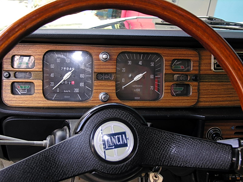 Lancia 2000 Armatourenbrett